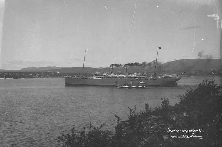 DS Kristianiafjord på Kristianiafjorden